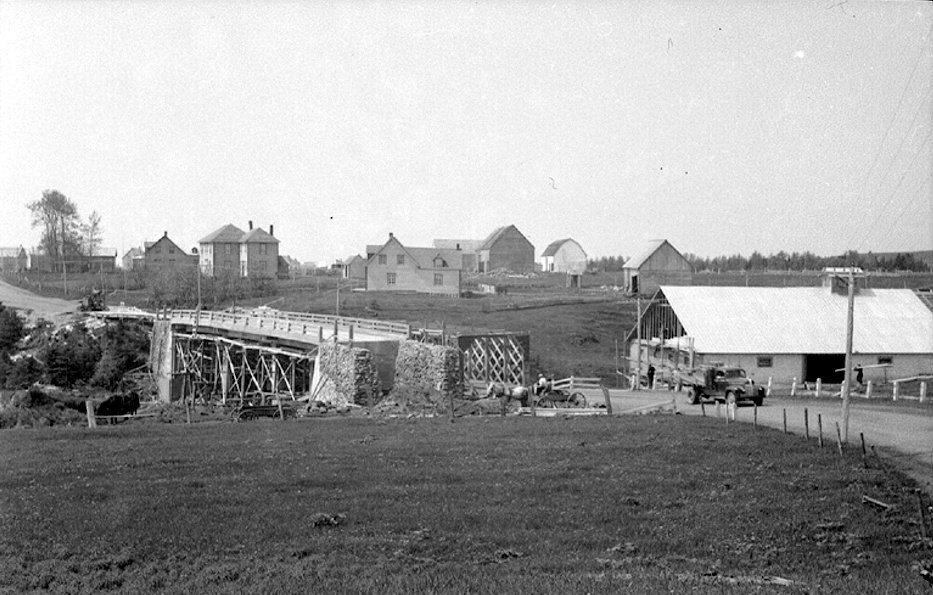 Pont sur la petite rivière Est à Sainte-Thérèse-de-Gaspé